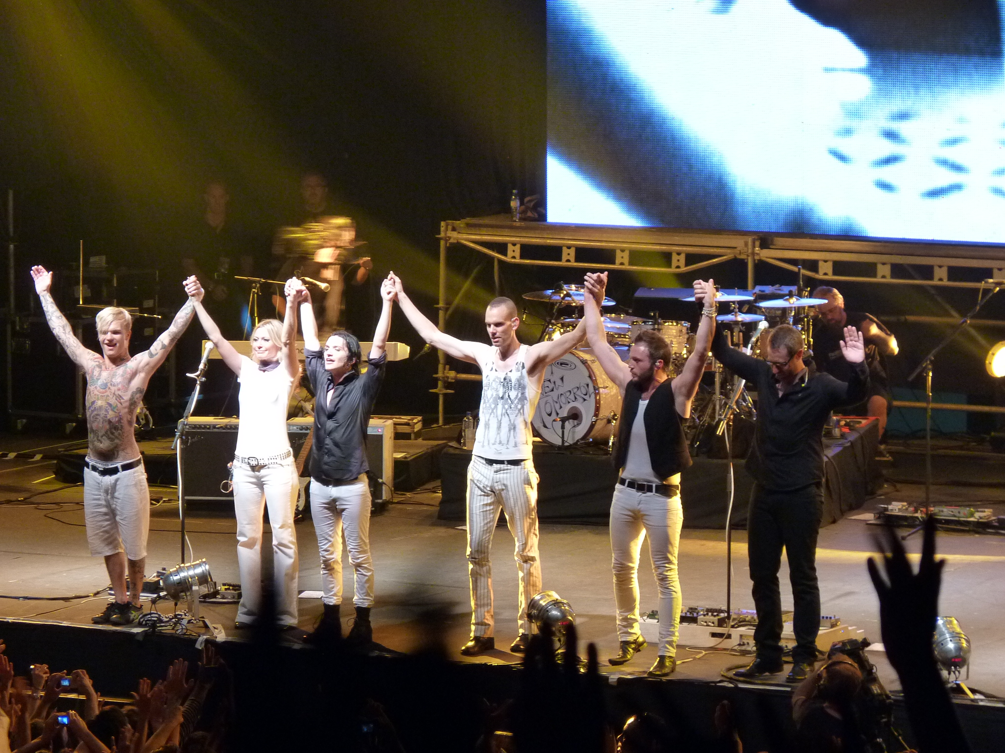 10 de abril de 2009, Placebo se despide en el Club GEBA de la ciudad de Buenos Aires